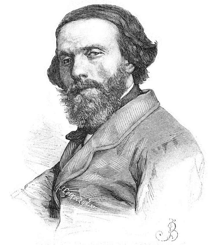 Cyprian Norwid